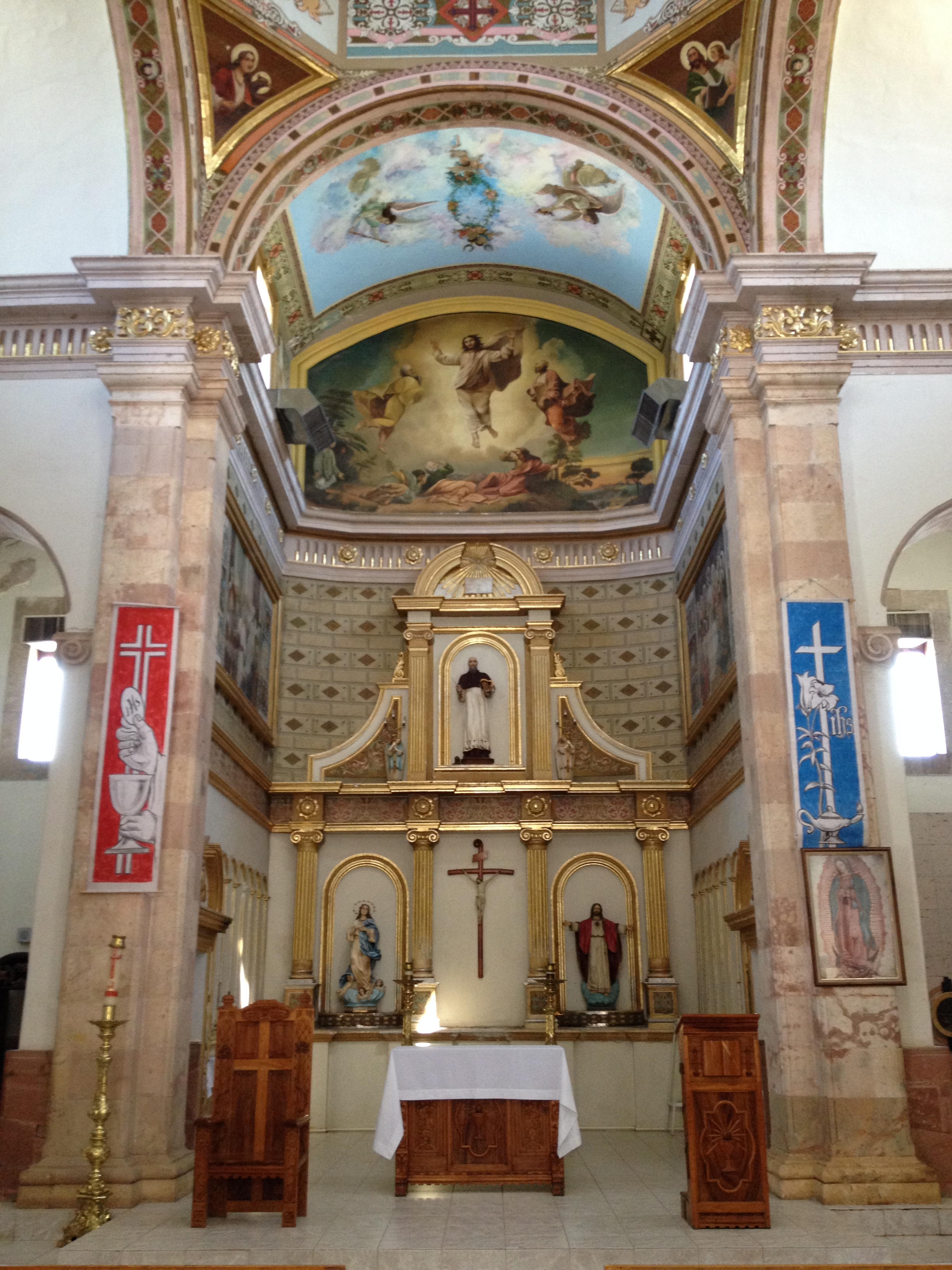 Altar mayor del Templo de San Jerónimo de Aldama, Chihuahua